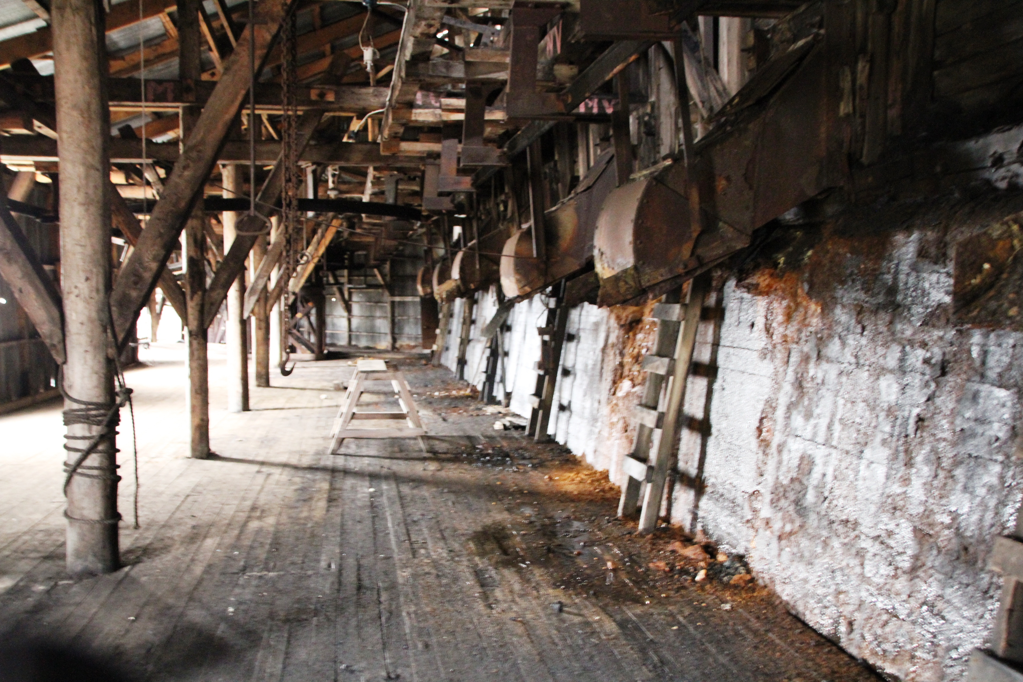 Mine No 2B ("Julenissegruva"), above Nybyen in Longyearbyen, Svalbard, Norway.